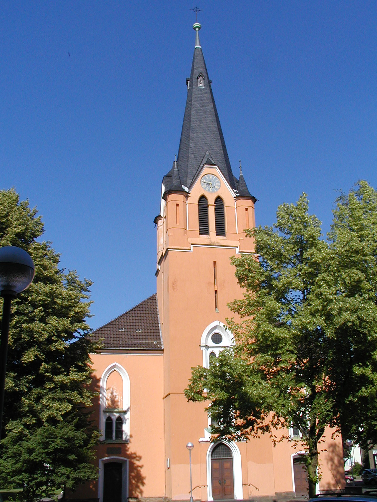 Die ev.-luth. Kirche im Stadtteil Hainholz in Hannover